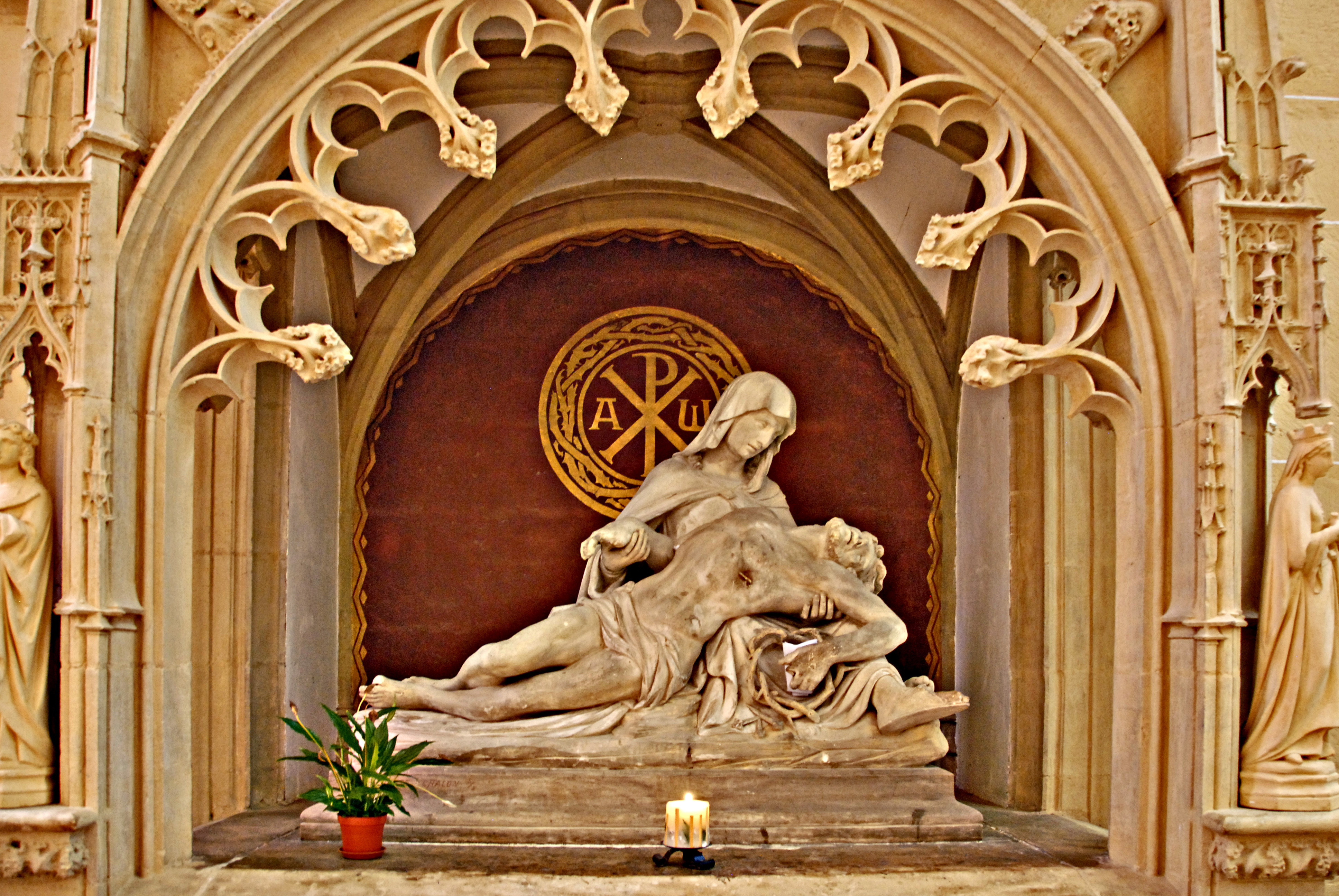 Pieta in südl. Querhauskapelle